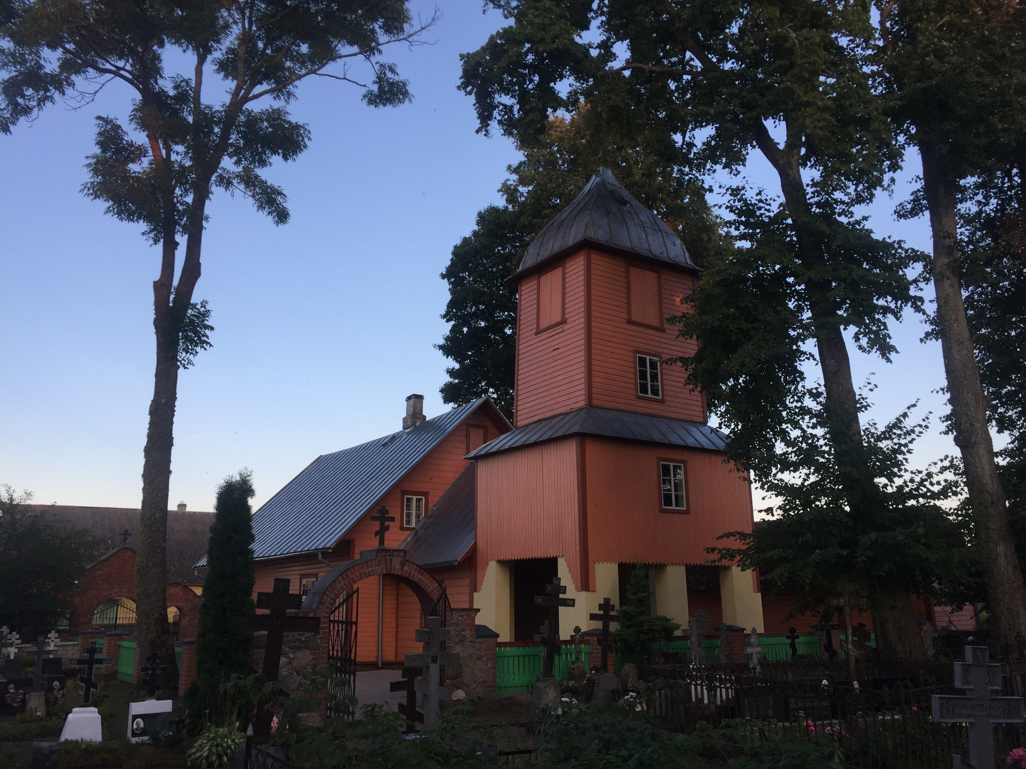 Kasepää vanausuliste kirik (2018)